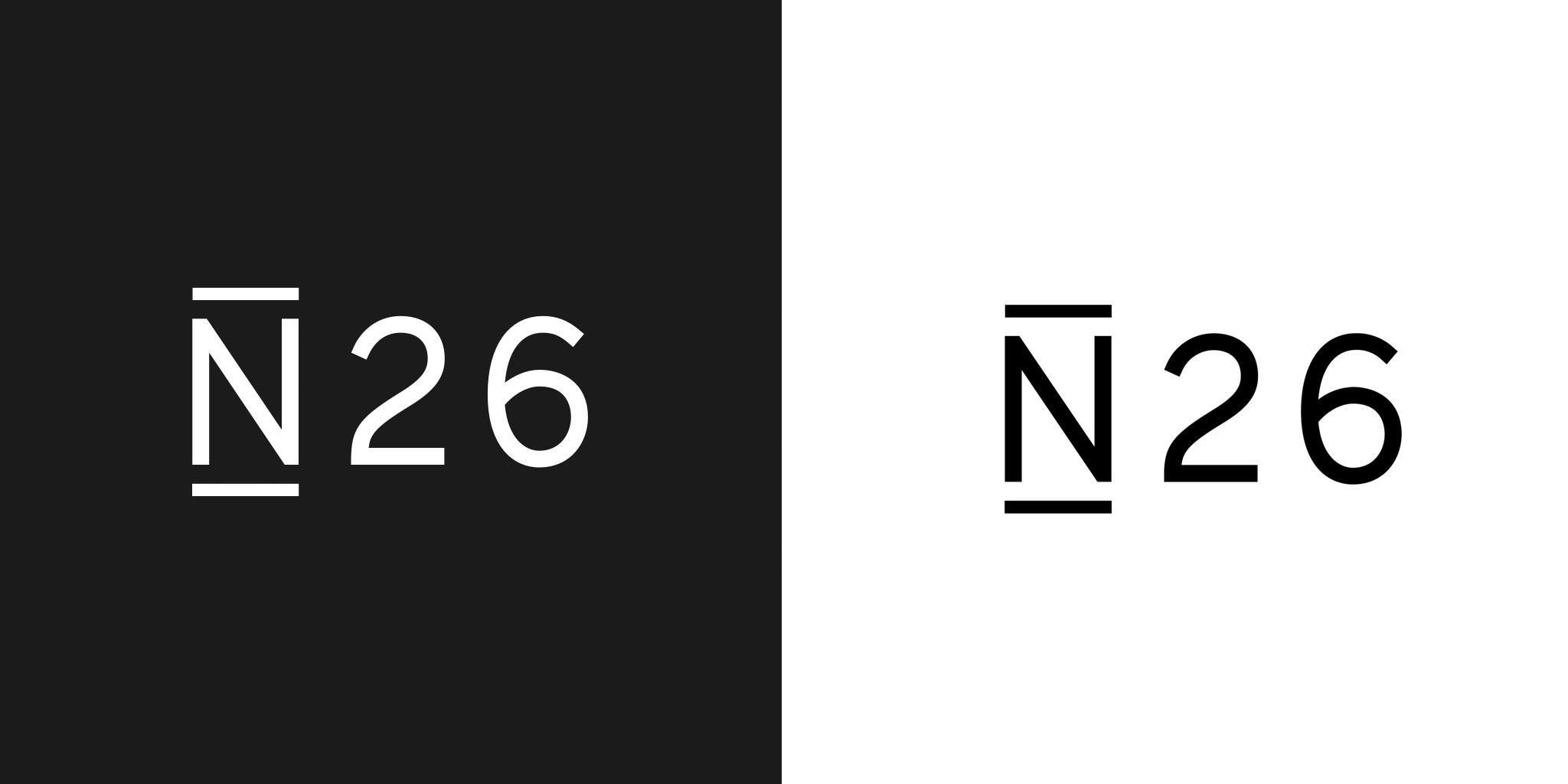 Logo banky N26